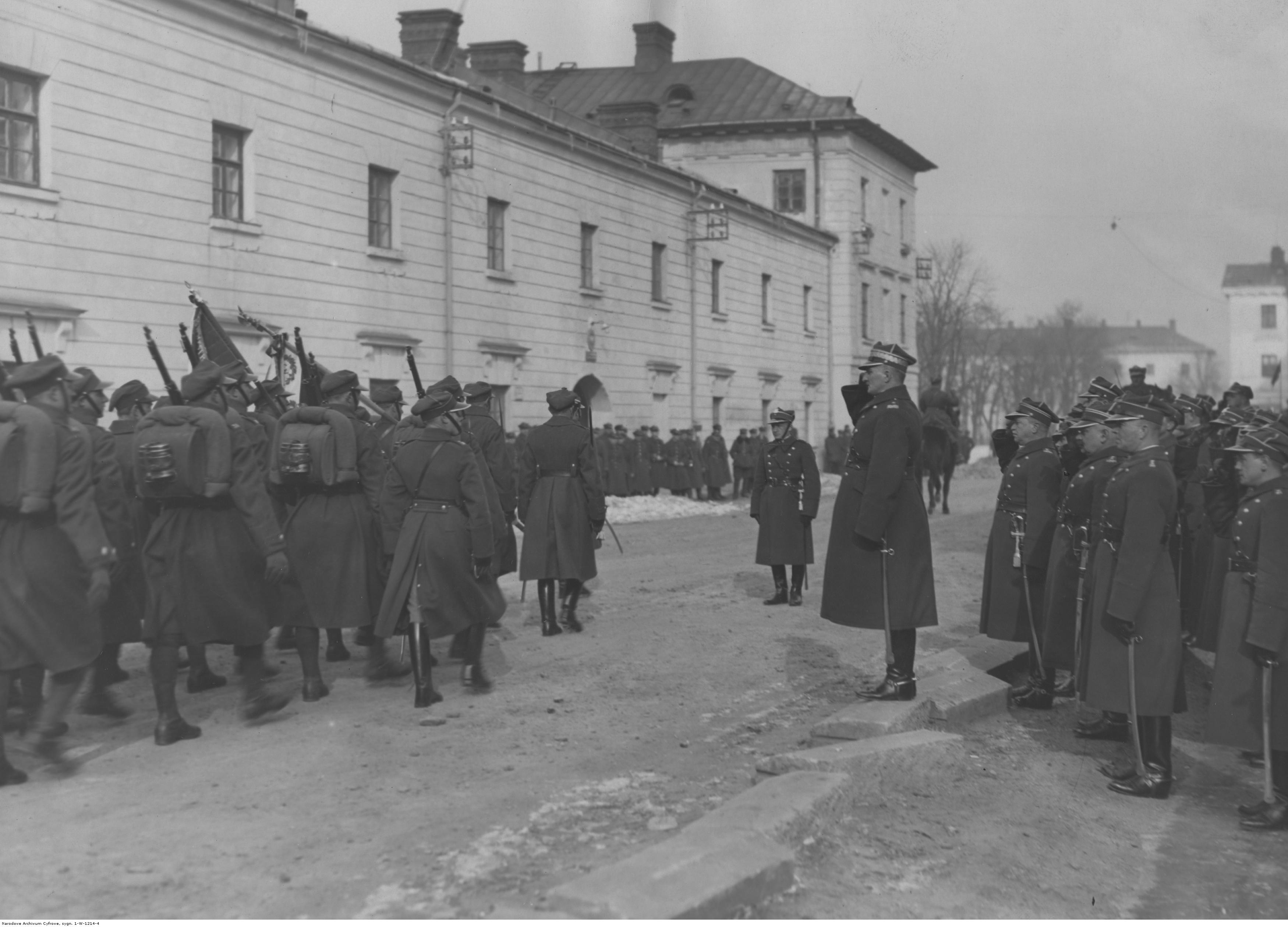 Wręczenie proporca 8 kompanii 30 Pułku Strzelców Kaniowskich za zdobycie I miejsca w zawodach strzeleckich 10 Dywizji Piechoty 5 marca 1932. Gen. Józef Olszyna-Wilczyński przyjmuje defiladę na terenie Cytadeli w Warszawie. Koncern Ilustrowany Kurier Codzienny - Archiwum Ilustracji. Sygnatura: 1-W-1214-4